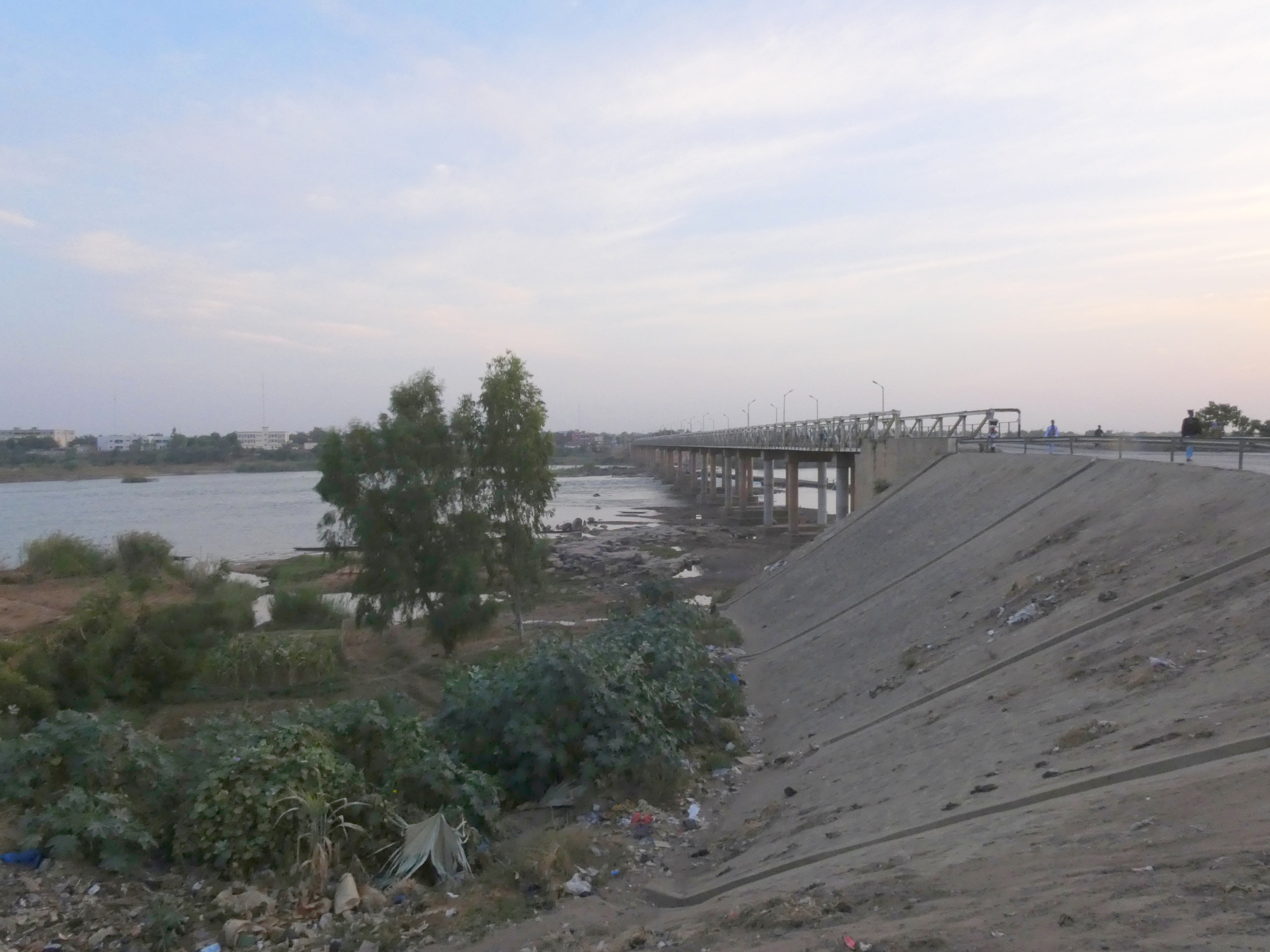 Senegalbrücke Kayes